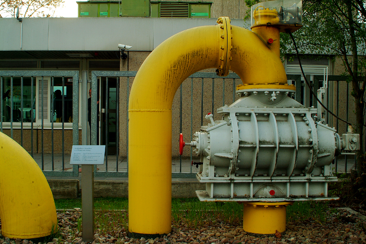 Sie haben ein besseres Bild? Sogar ein historisches Dokument als Bild(ungsförderung)? Zeigen Sie' s uns. Stiften Sie es, allen Menschen.